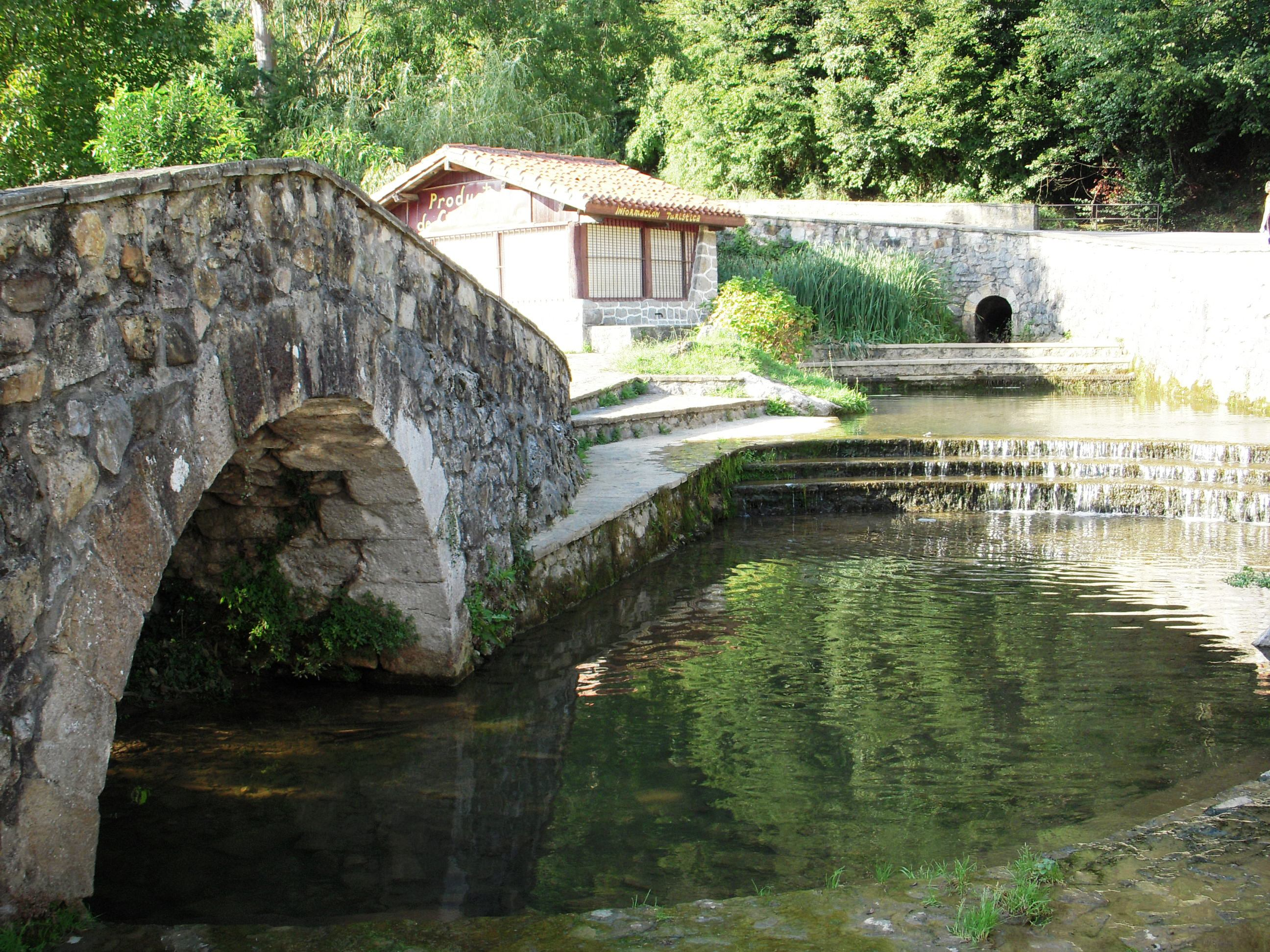 Aguas cristalinas